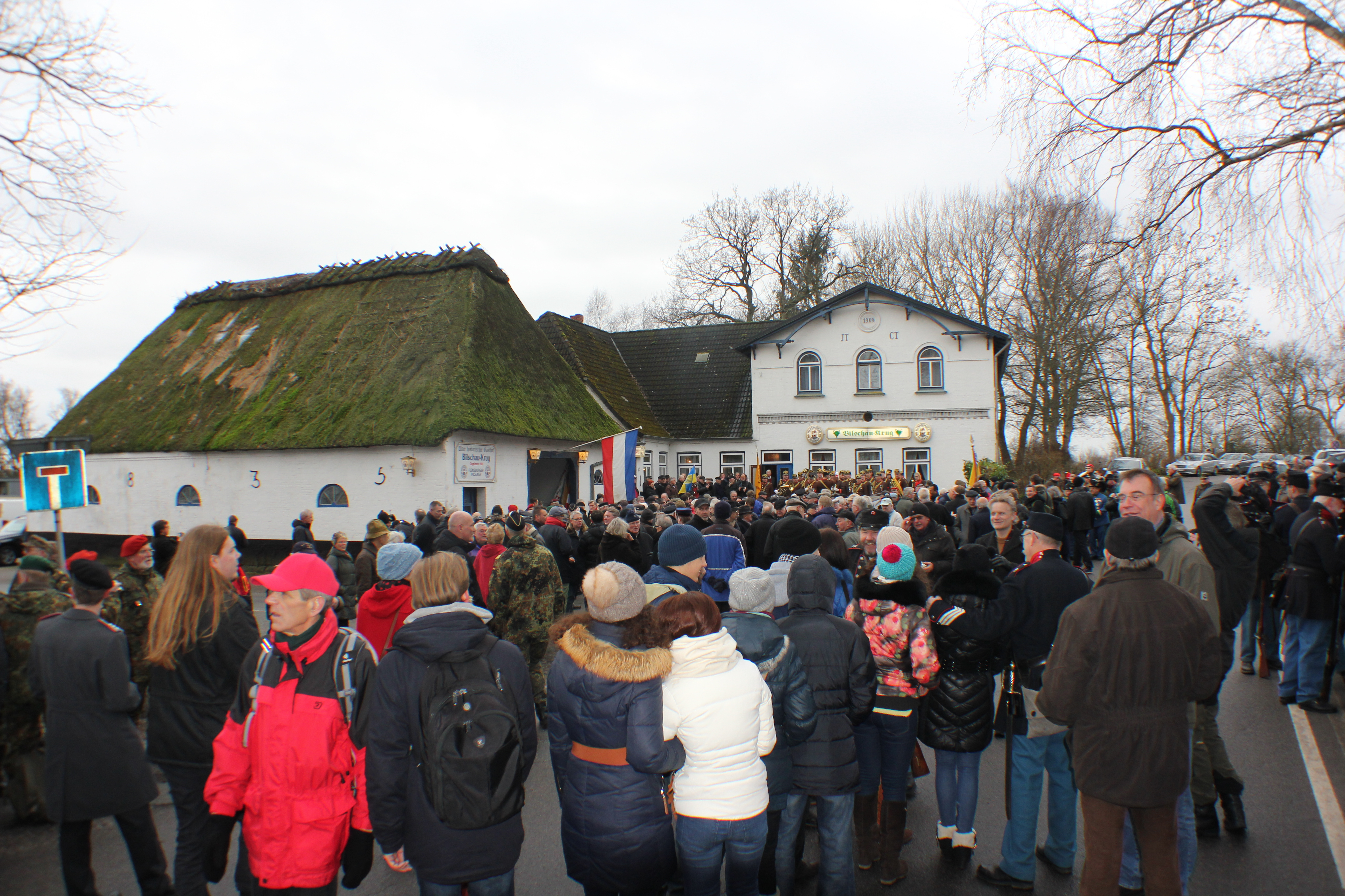 Vom Oeversee-Marsch, das Sammeln vor dem Krug von Oeversee, (150. Oeverseegedenken, 2014)